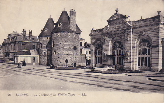 Tårne og théâtre municipal før krigen.